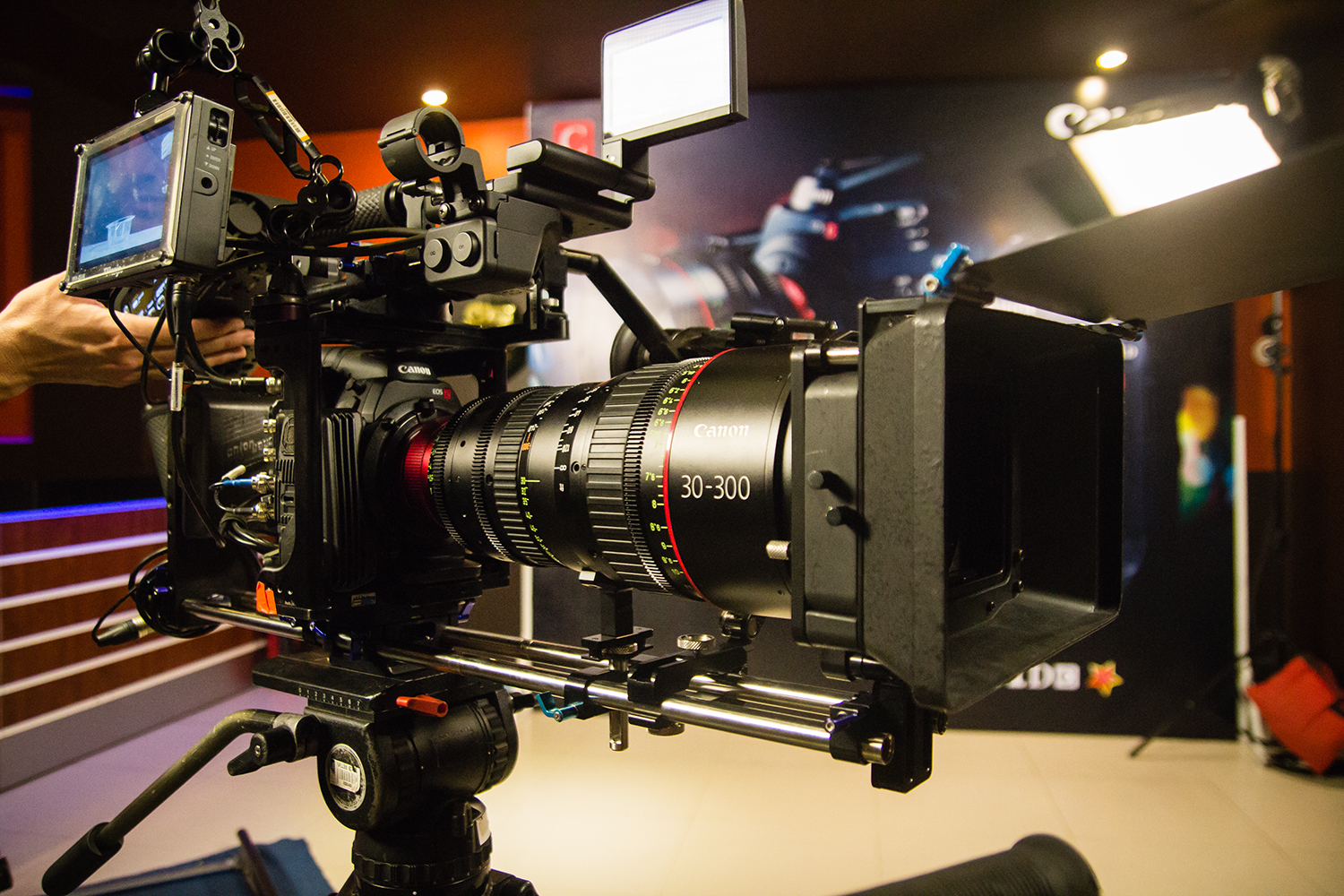 Canon EOS C500 + CN-E 30-300mm Cine lens